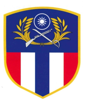 中文（台灣）: 國防部陸軍司令部隊徽